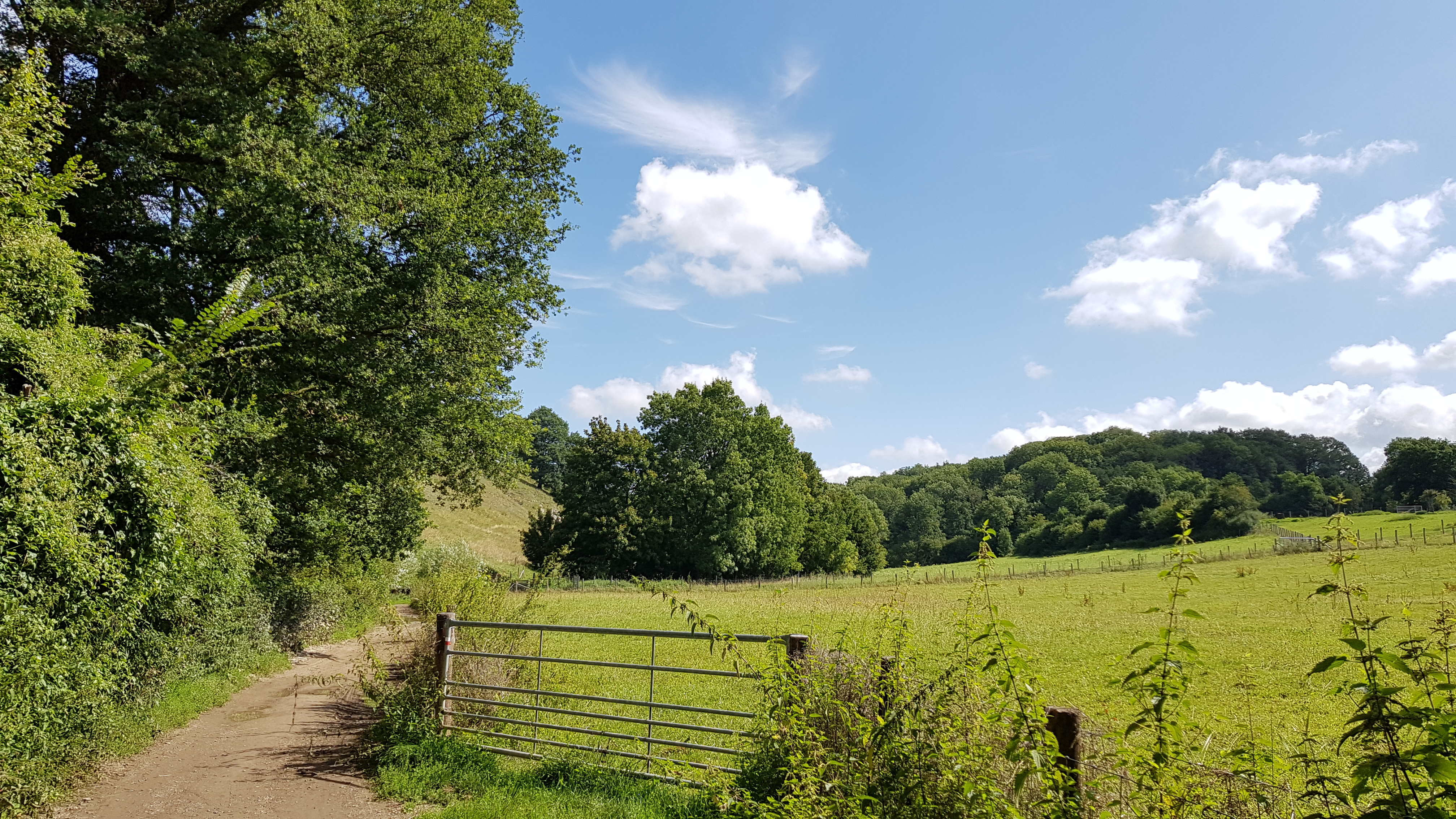 Winkelberggroeve bij Bemelen, Nederland